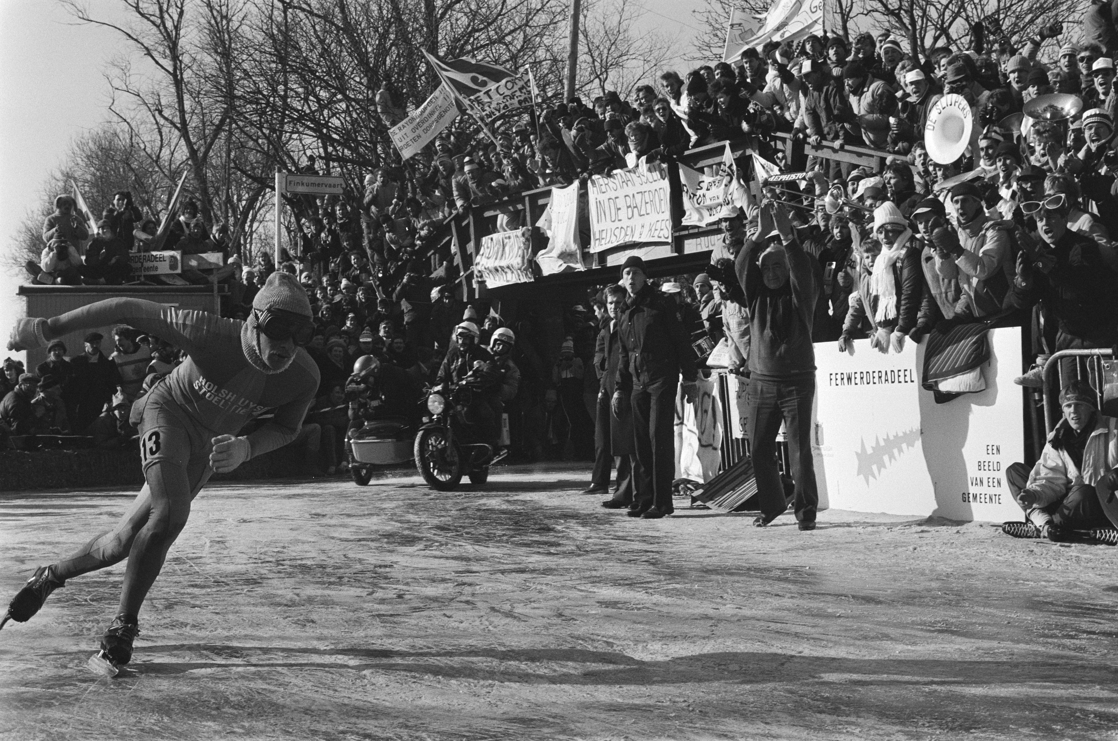 Elfstedentocht 1986. Evert van Benthem in Bartlehiem. 26 februari 1986